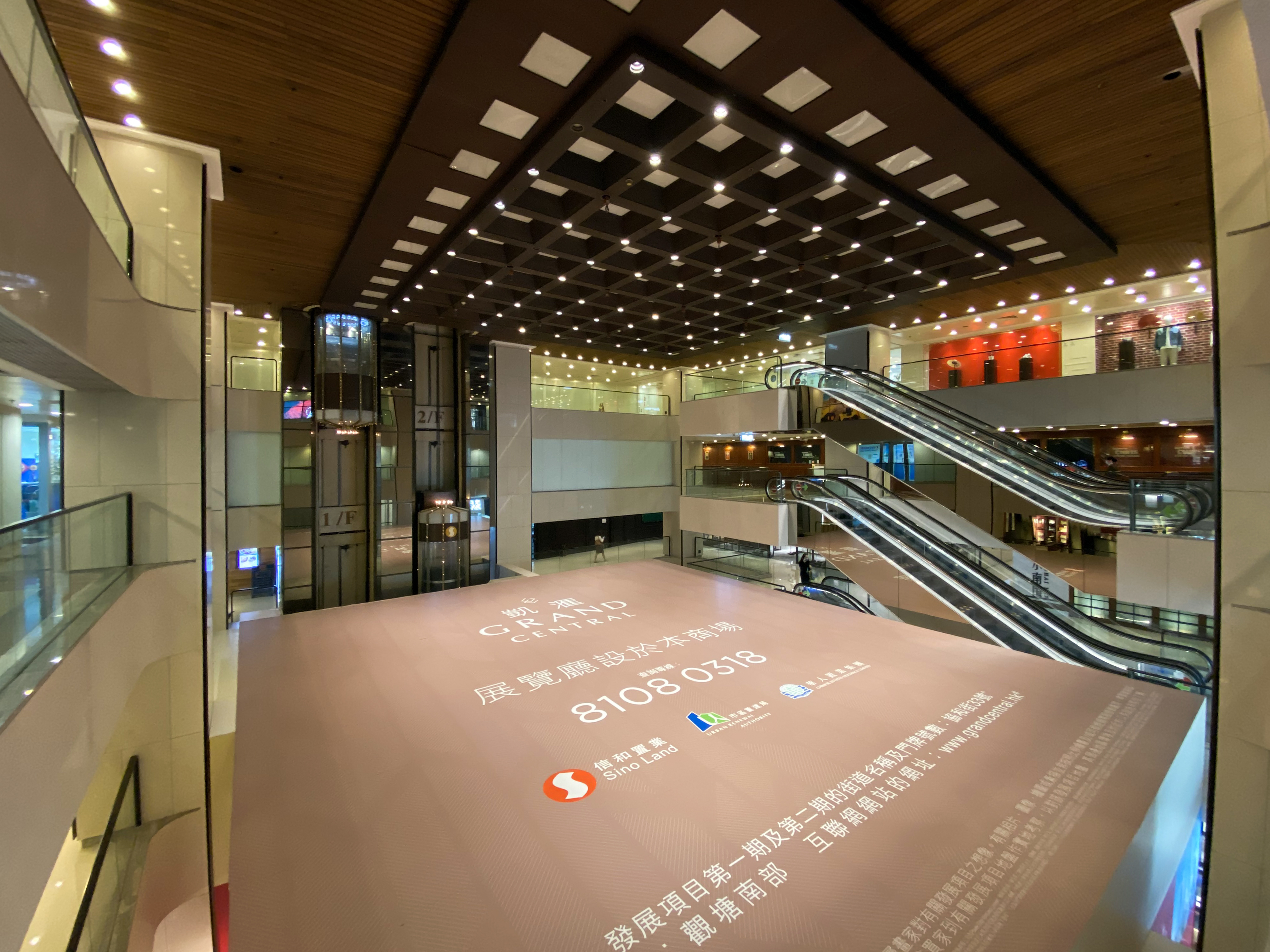 Tsim Sha Tsui Centre Atrium